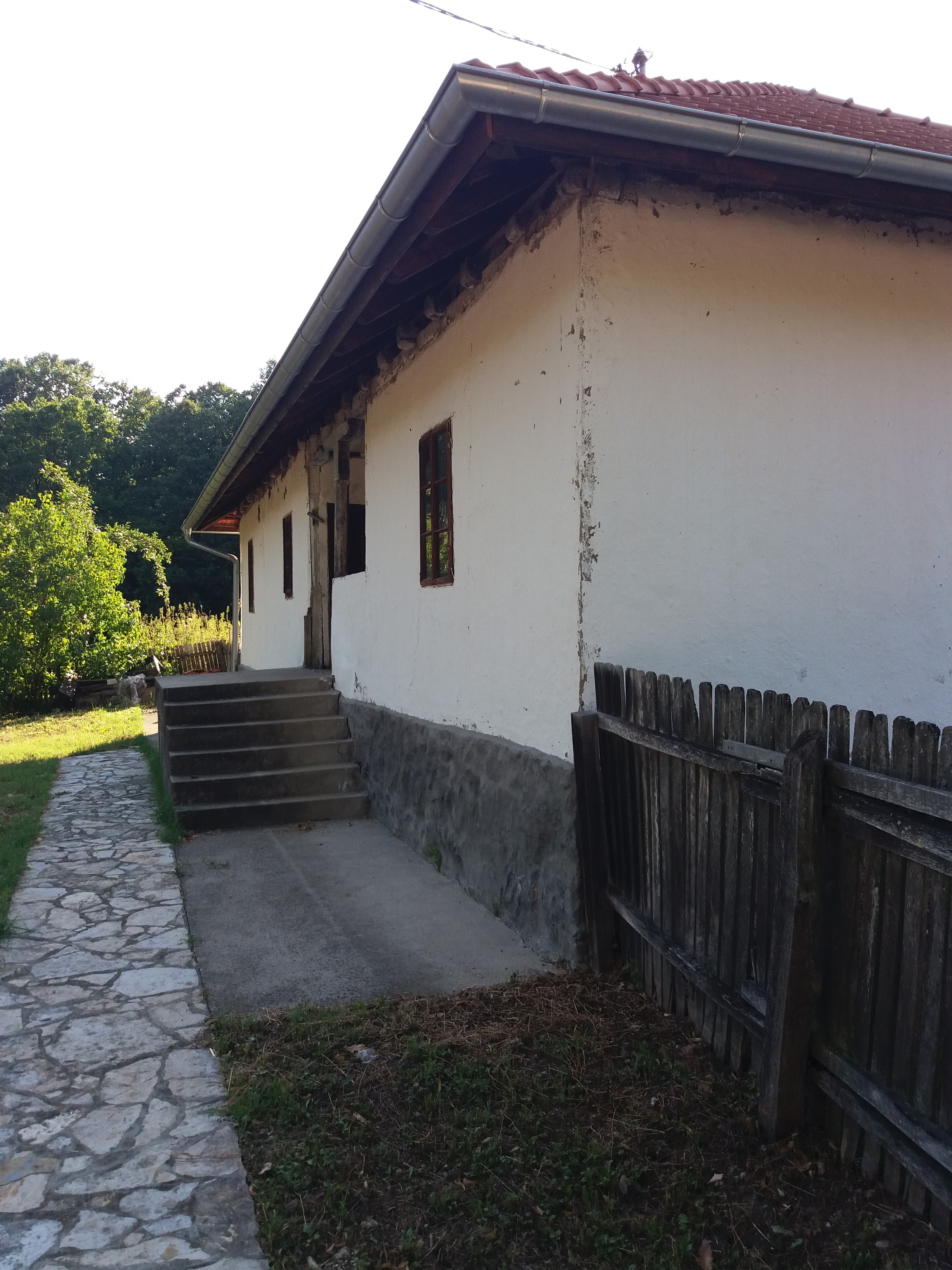 Srpski (latinica): Crkva Svete Trojice, Cerovac